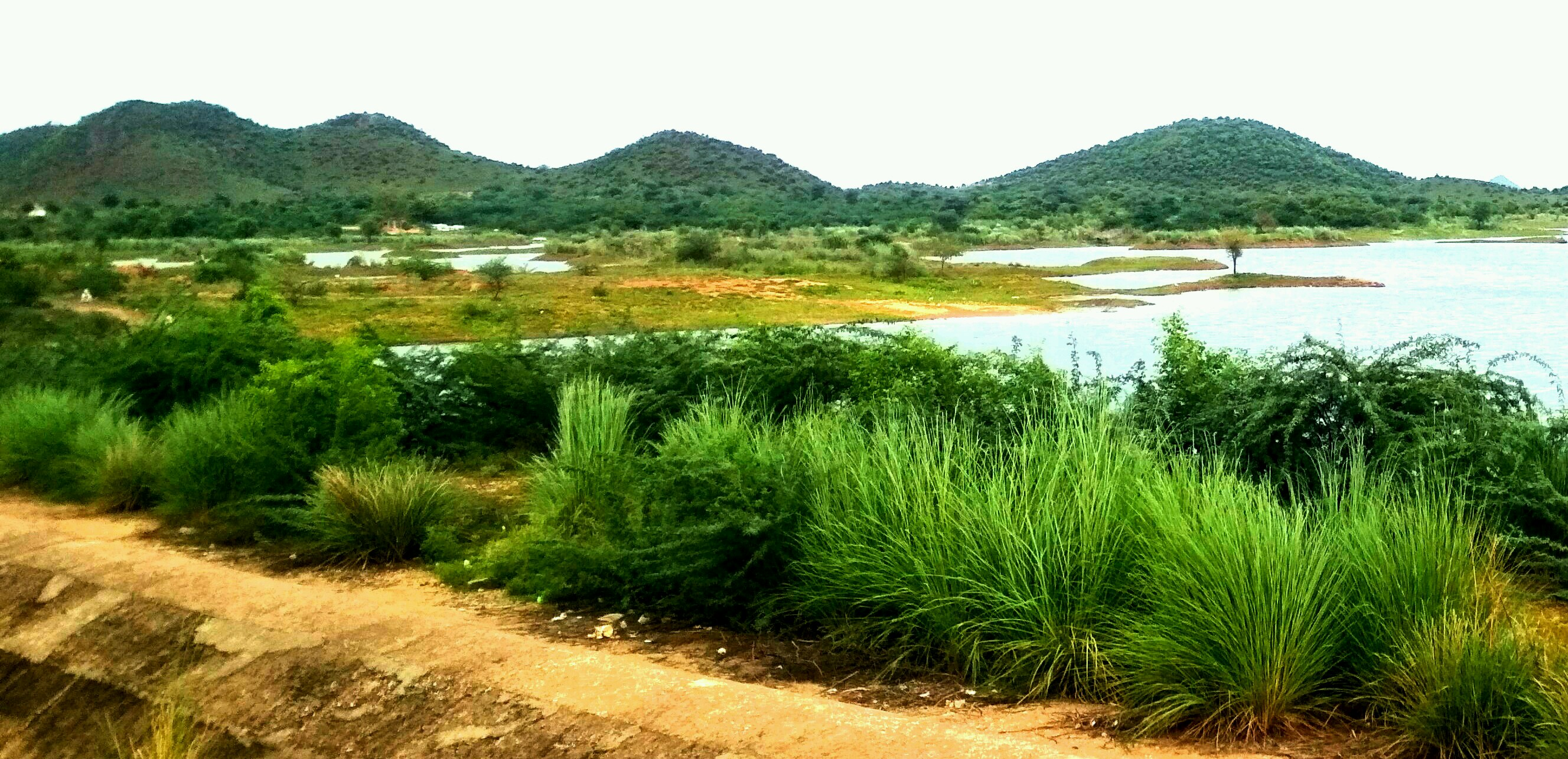 हिण्डौन में स्थित है जगर का बांध